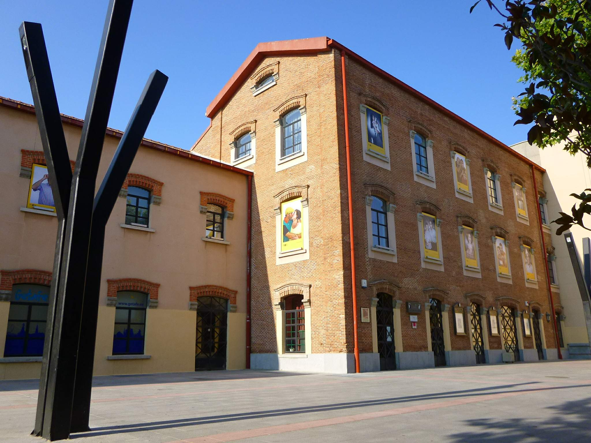 Delegación Municipal de Cultura de Getafe